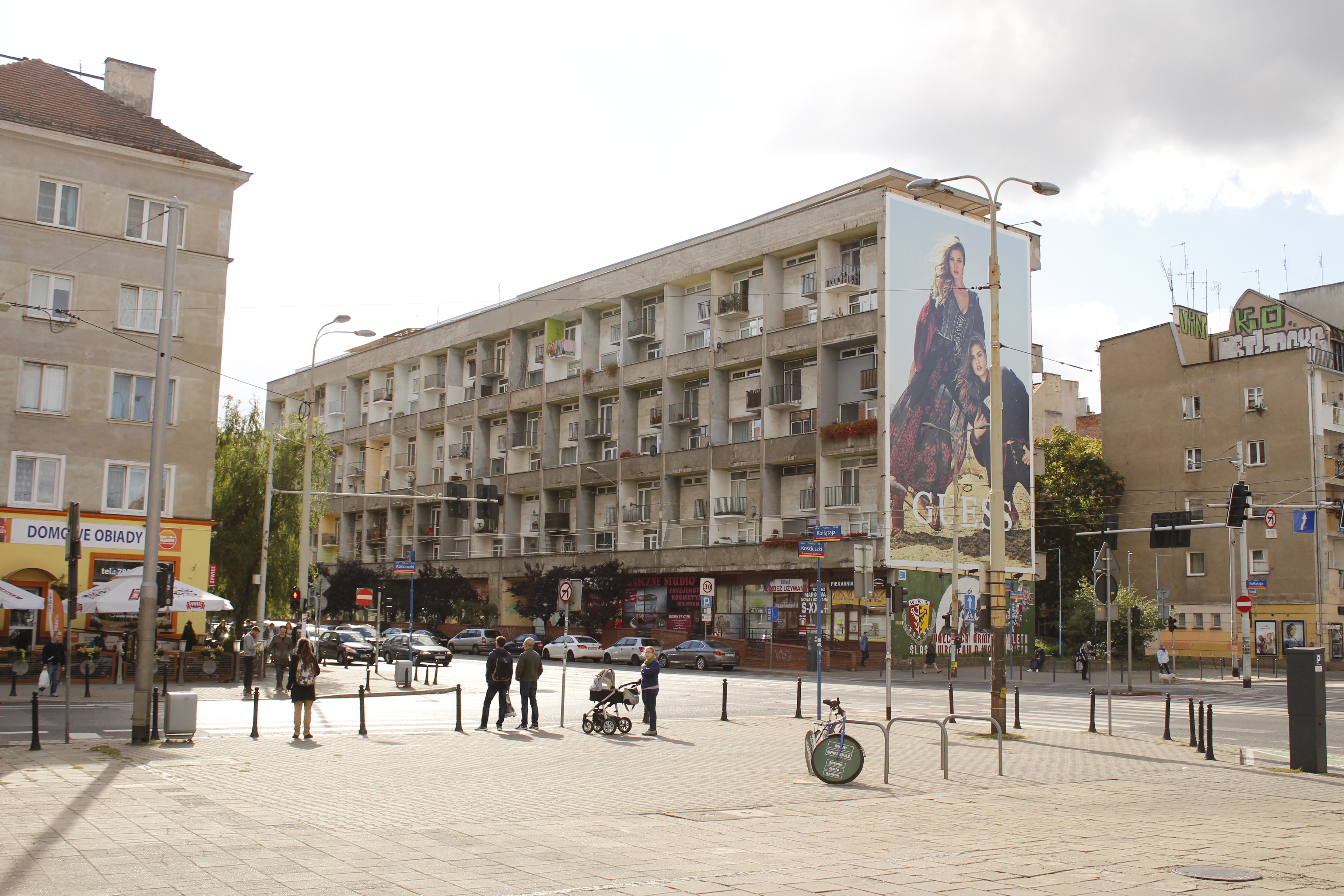 Budynek mieszkalny przy ul. Kołłątaja, widok z ulicy Kościuszki